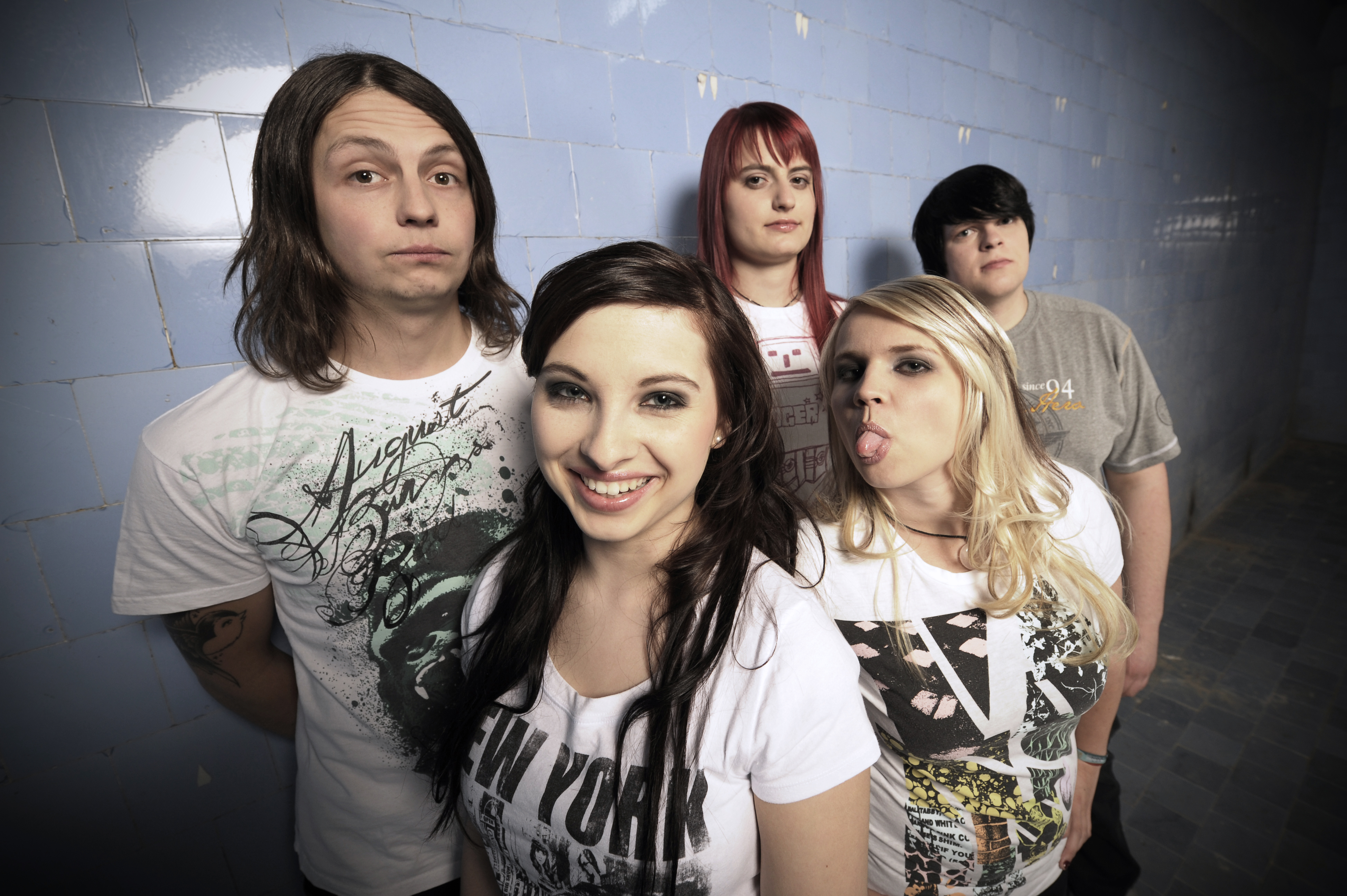 Revolving Door (engl.: Drehtür, mit der Bedeutung sich in einer ausweglosen Situation zu befinden), eine deutsche Rockband aus Neuhaus am Rennweg, die dort 2006 gegründet wurde.